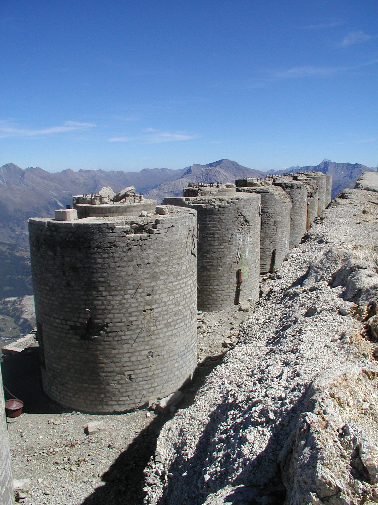 alcune delle torri della batteria dello Chaberton